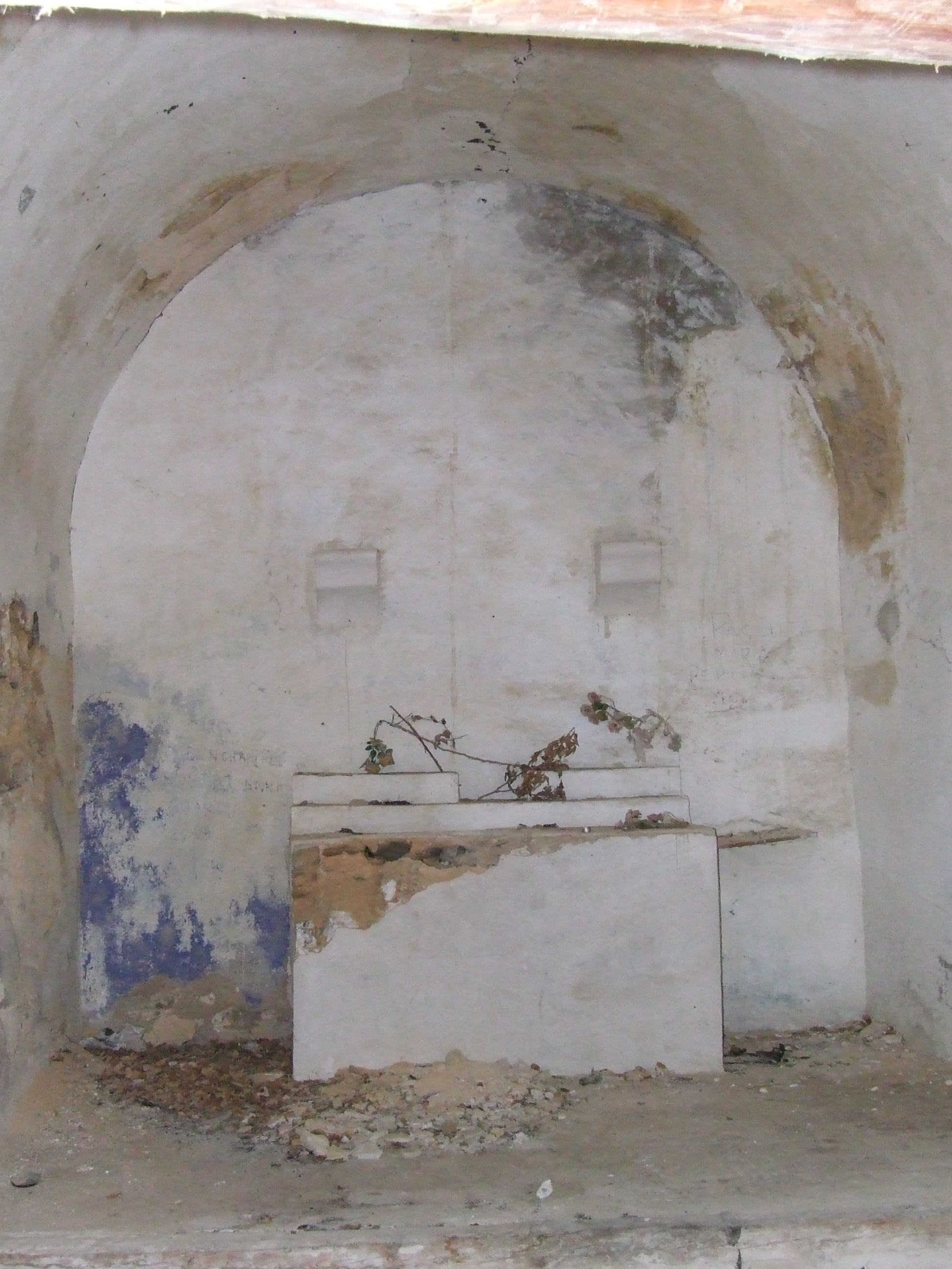 Sant Miquel d'Herba-savina (Hortoneda de la Conca, Conca de Dalt, Pallars Jussà)